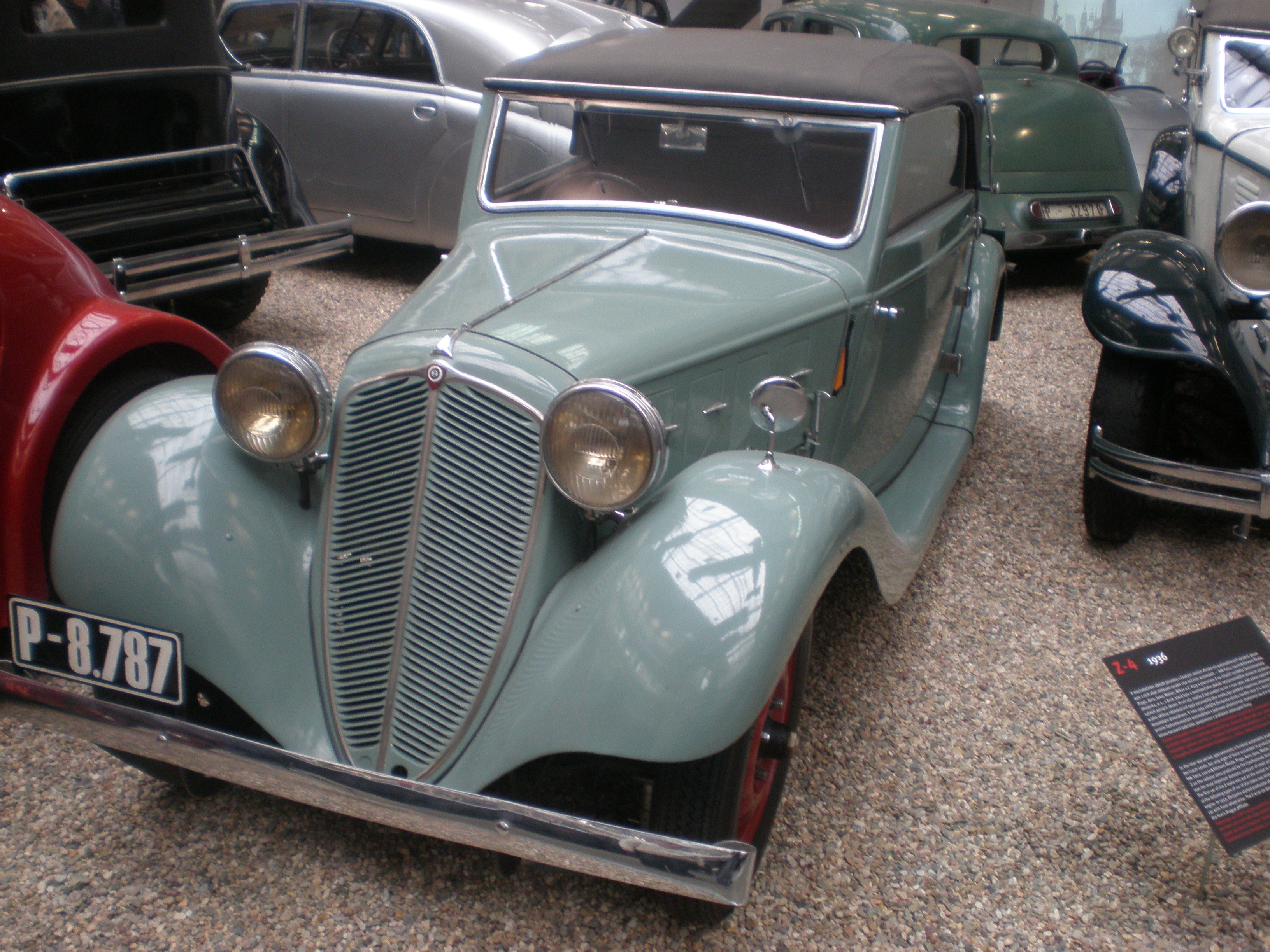 Z-4, 1936